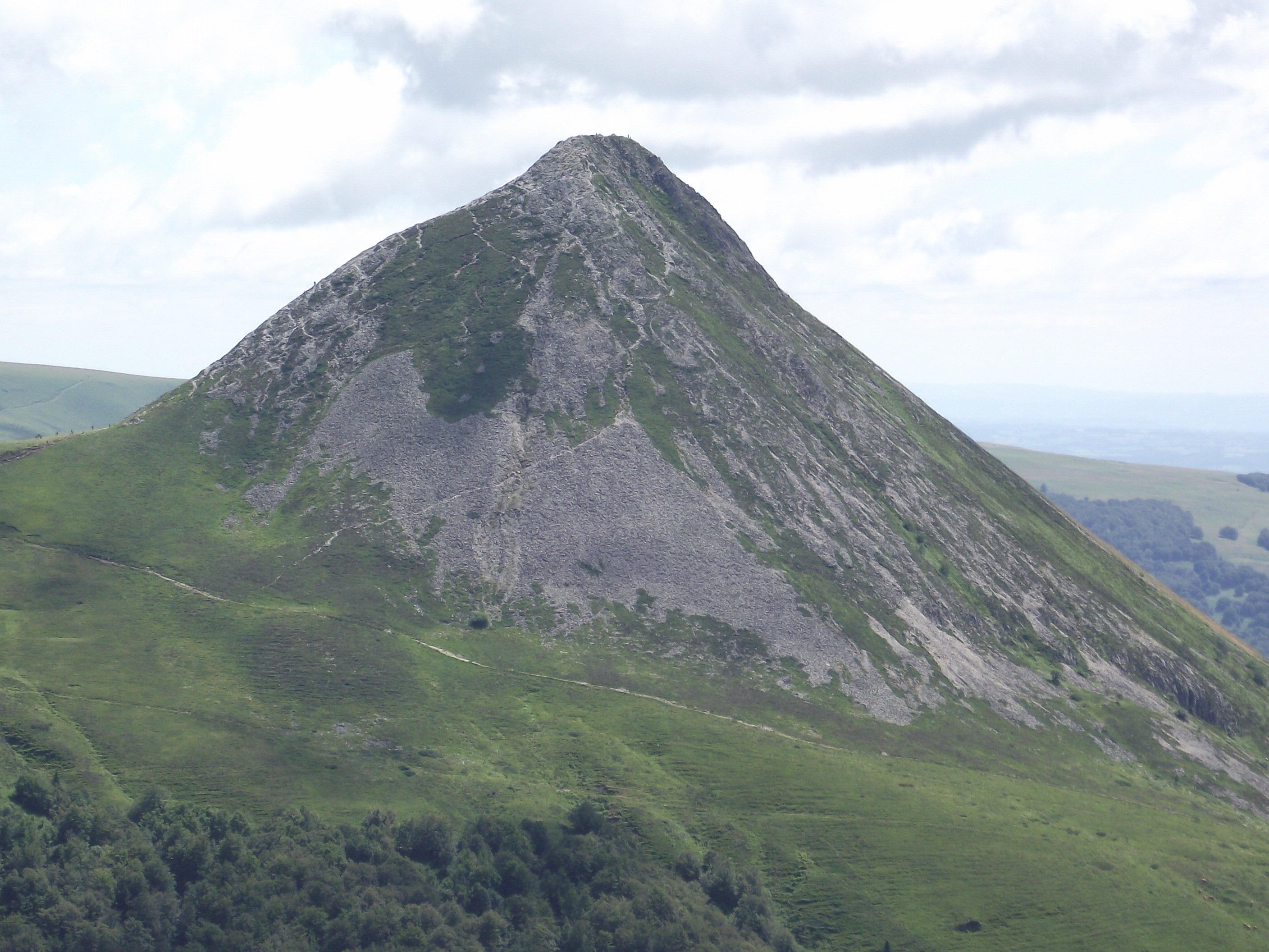 Face Nord du puy Griou (1690 m) vue des fours de Peyre-Arse.